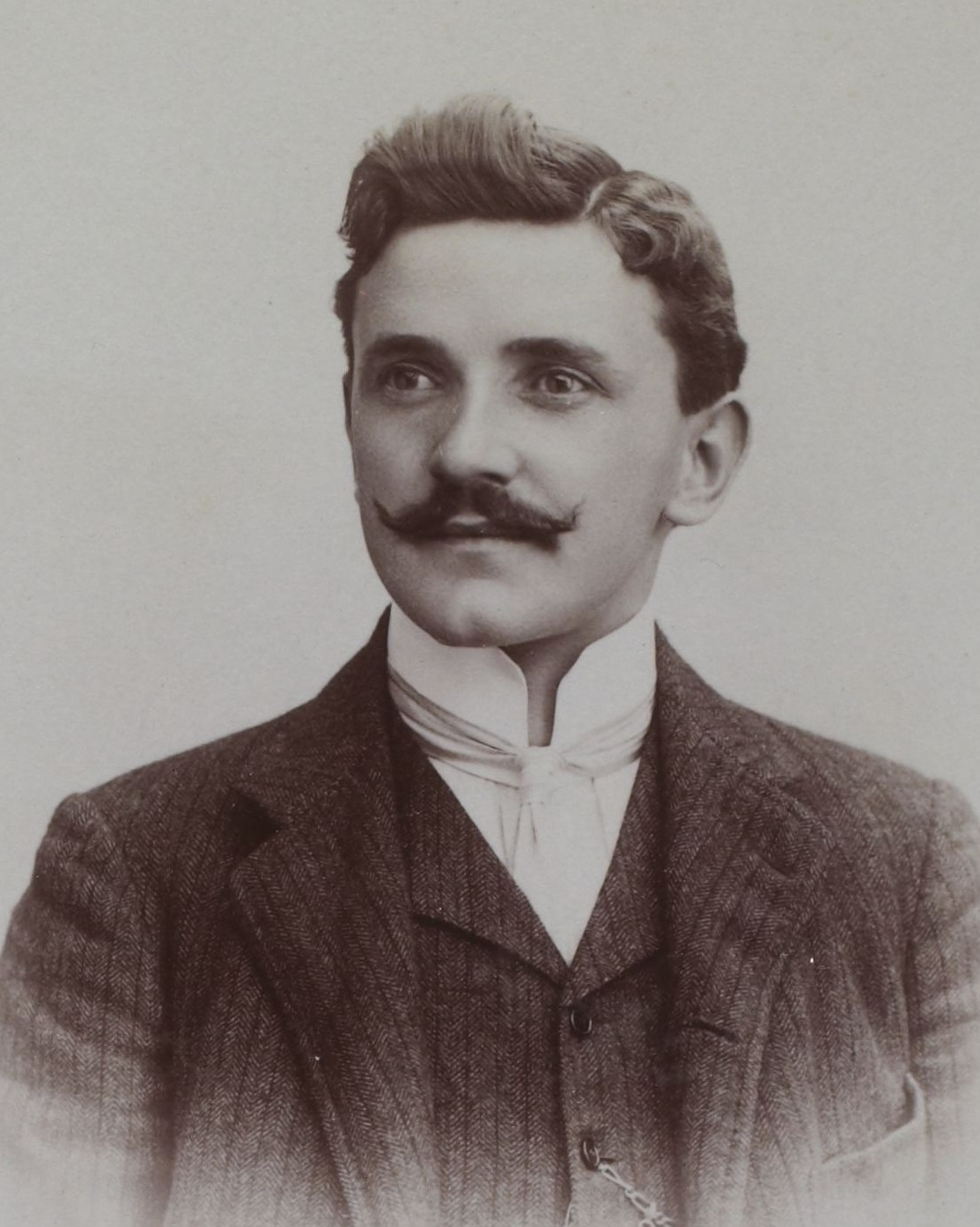 [Collection Jules Beau. Photographie sportive] : T. 22. Année 1903 / Jules Beau : F. 18. Rigal ; Gabriel